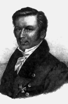 Russian naturalist Johann Friedrich von Eschscholtz (1793-1831)